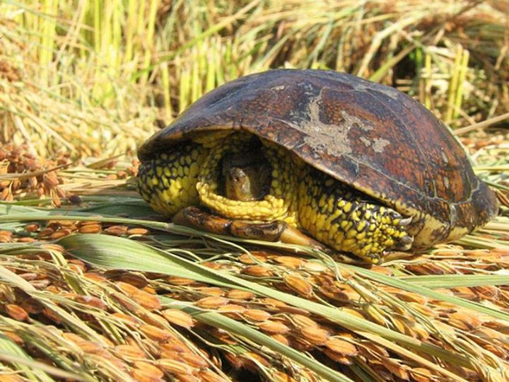 Ahoudasht-Sari-Mazandaran-Iran